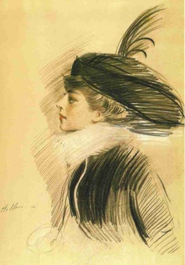 Pastel portrait of Belle da Costa Greene by Paul César Helleu ca. 1913